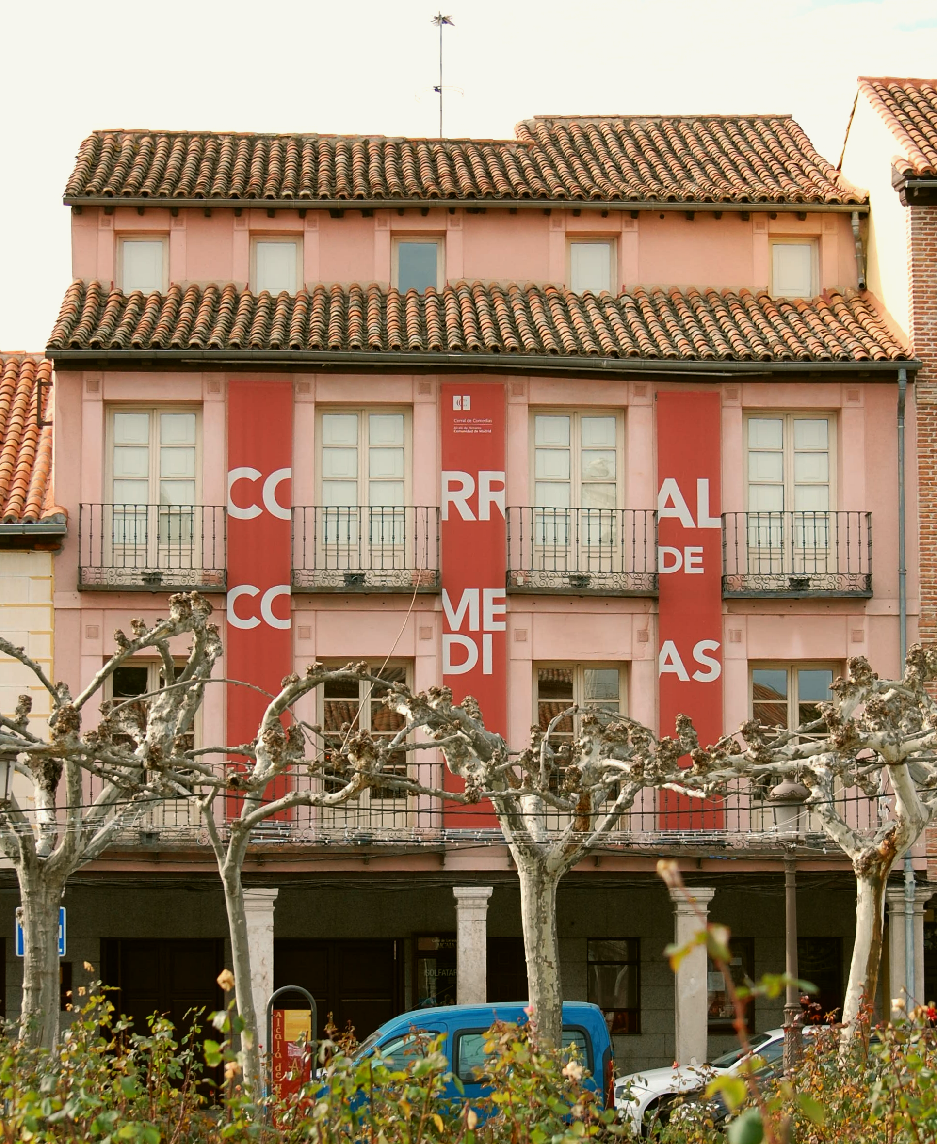 Fachada principal del Corral de Comedias de Alcalá de Henares (Comunidad de Madrid - España). De estilo renacentista, inaugurado en 1602.